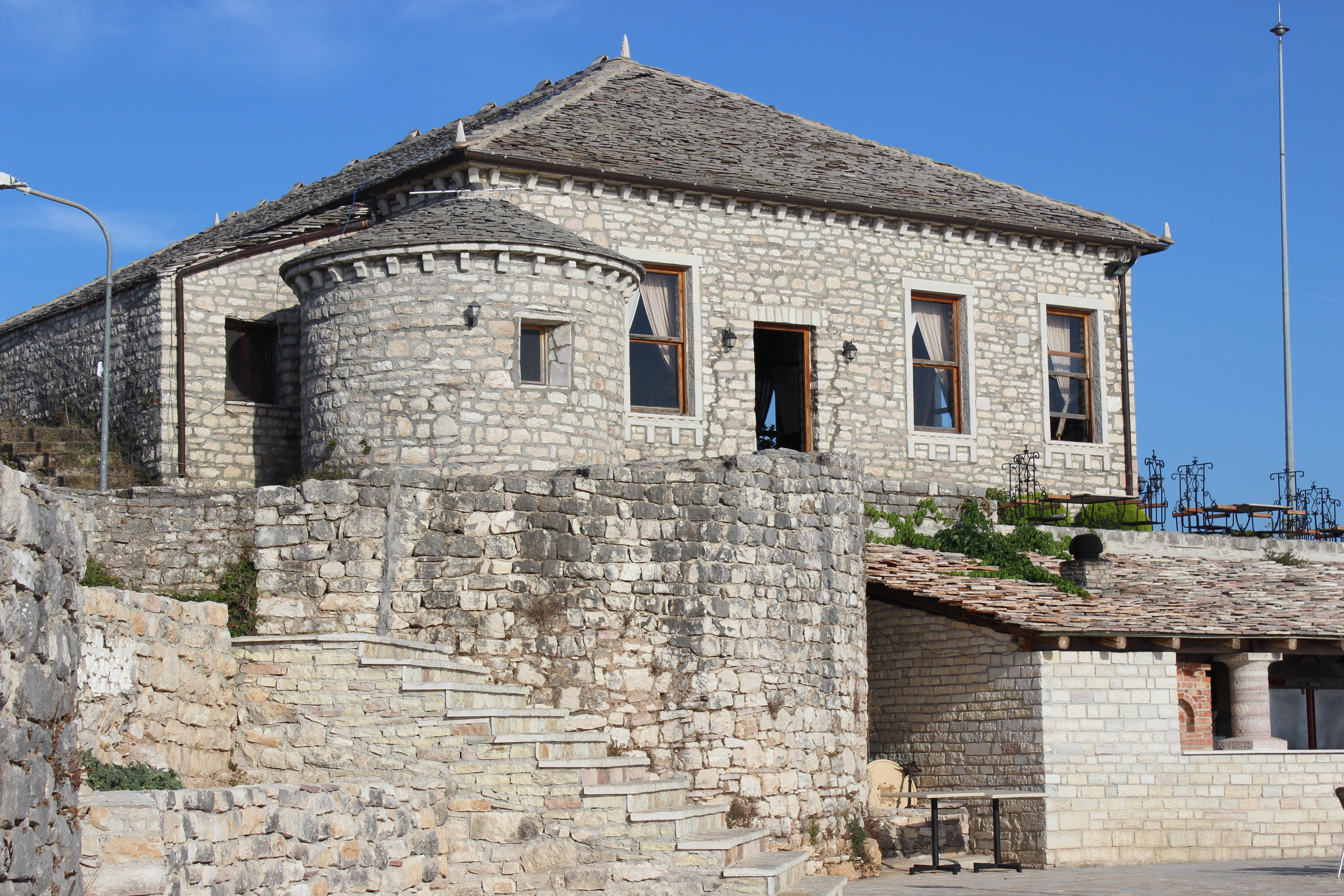 Kalaja E Lekursit